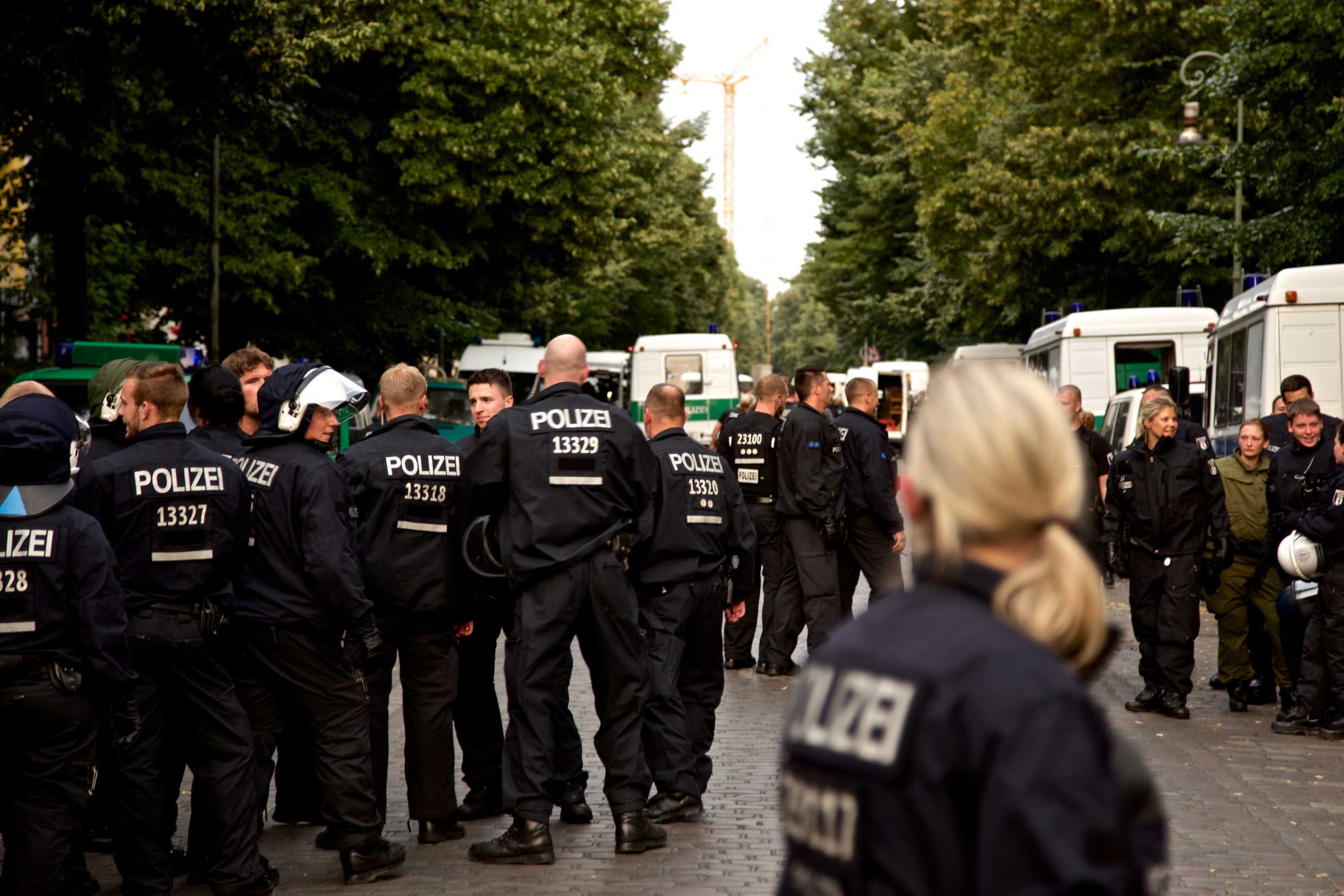 Seit dem 24. Juli 2014 haben ca. 900 PolizistInnen aus dem gesamten Bundesgebiet den Kiez um die ehemalige Gerhart Hauptmann Schule an der Ohlauer Straße in Berlin Kreuzberg zum Sperrgebiet gemacht. Erklärtes Ziel war es, den rund 250 Flüchtlingen, die gegen die bestehenden Zustände protestierten, beim "freiwilligen Umzug zu helfen". Ca. 50 Flüchtlinge weigern sich bisher ihren Protest zu beenden, die ehemalige Schule zu räumen und sitzen zu ihrer Sicherheit seit dem 24.06.14 auf dem Dach des Gebäudes. Mehr Infos zu der Räumung und den darauf folgenden Protesten findet man u.a. hier: Diese Fotos entstanden während eines "Abendspaziergangs" rund um das Sperrgebiet am 27. Juli 2014. KEIN MENSCH IST ILLEGAL! Protests against eviction of Gerhart-Hauptmann-Schule in Berlin-Kreuzberg